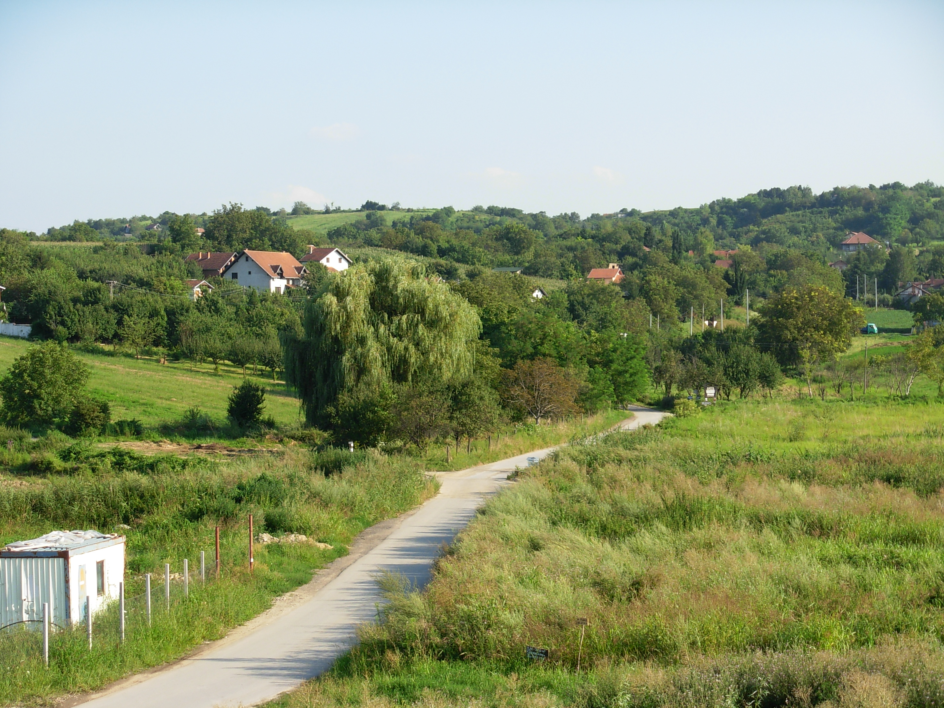 Naselje Karagača, Petrovaradin.